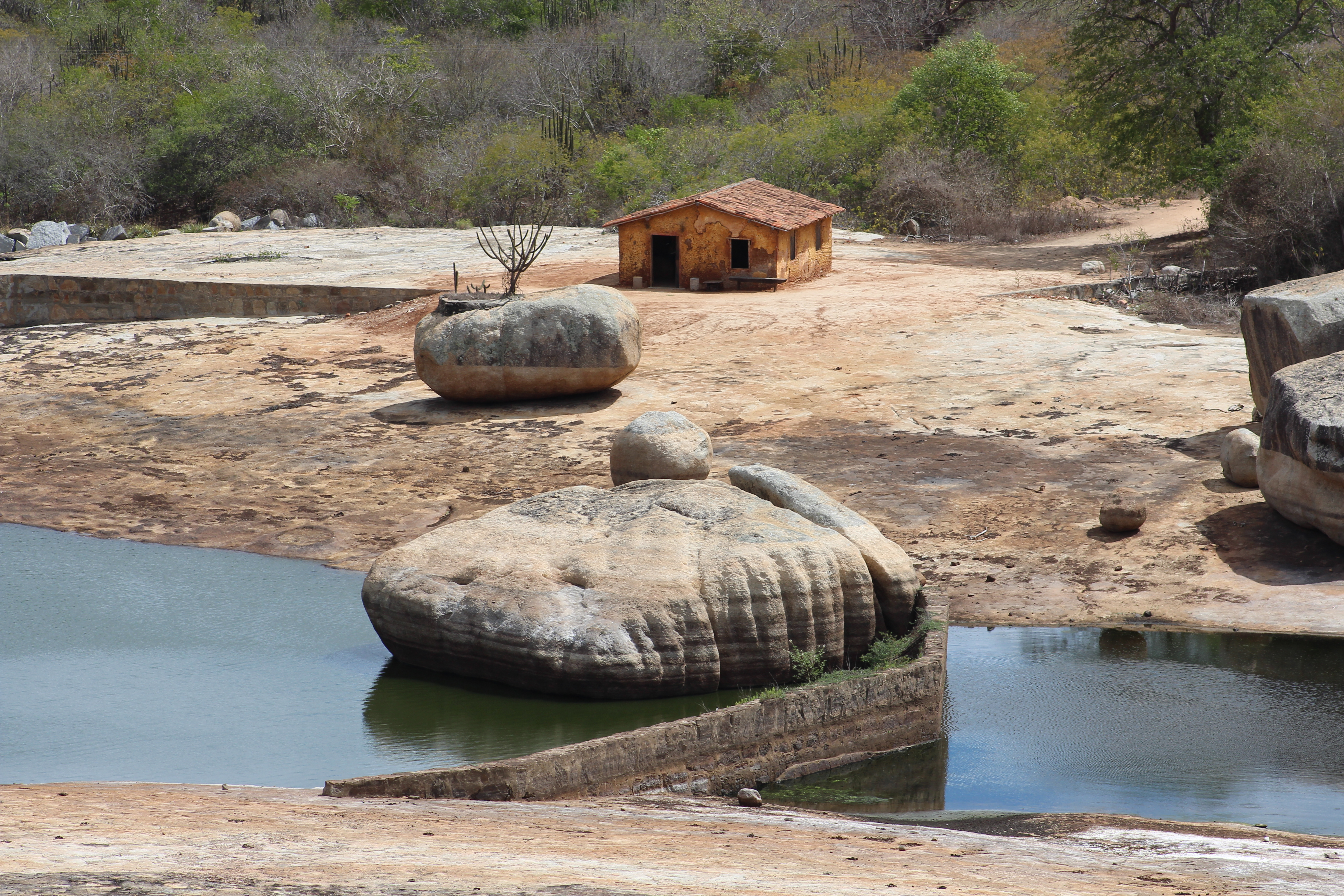 Casa no Parque Estadual do Lajedo do Pai Mateus